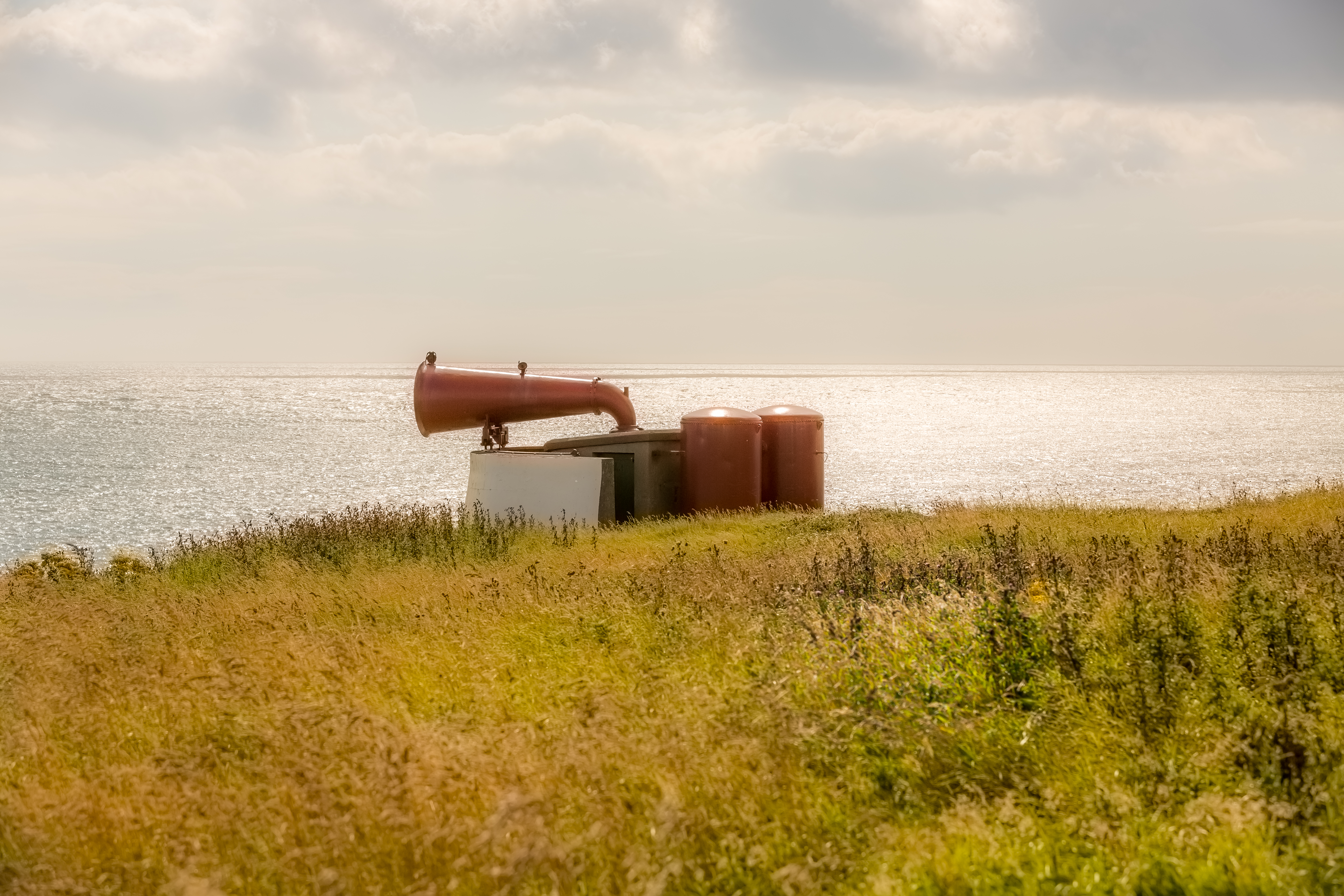 Aberdeen FogHorn